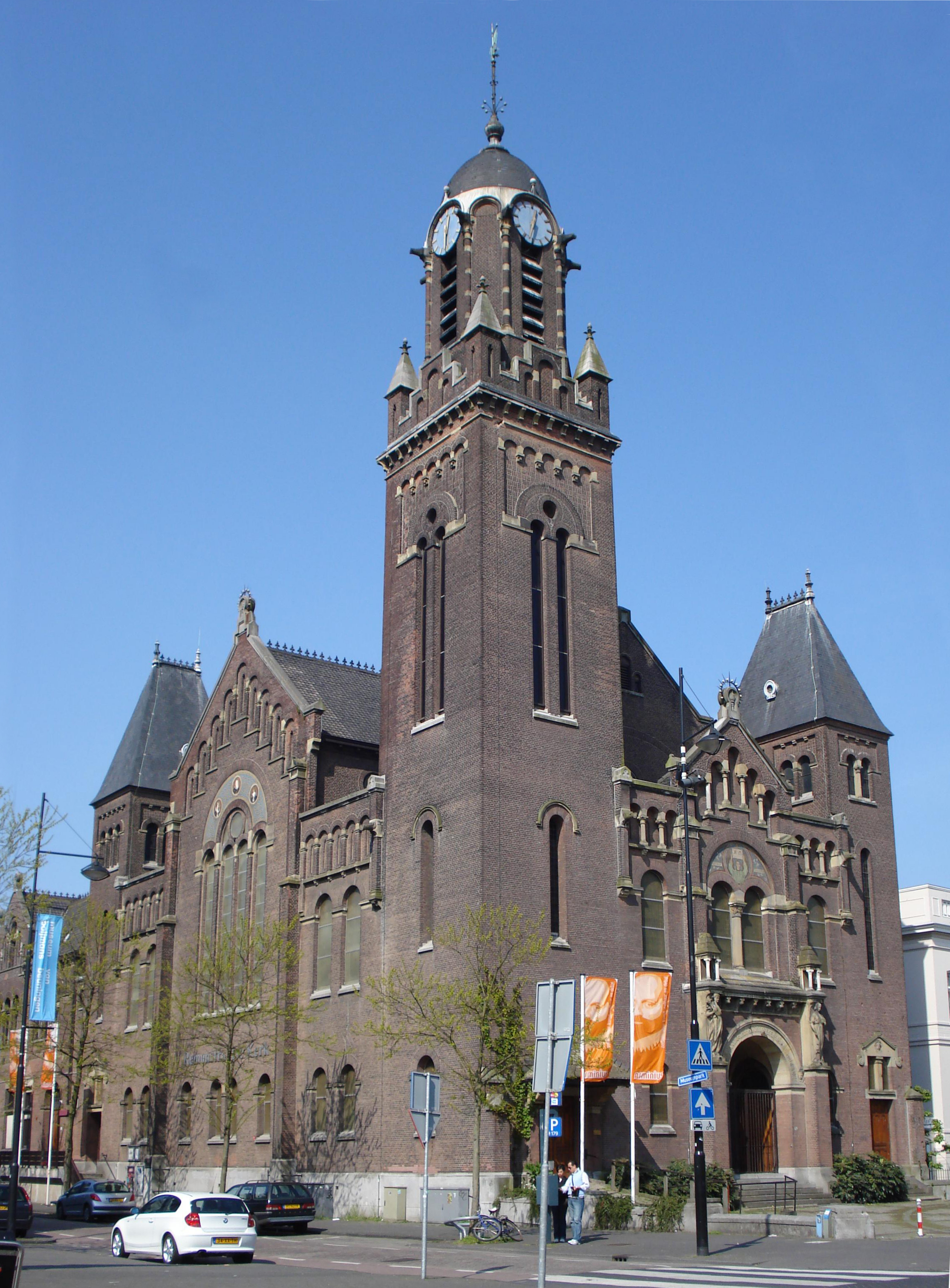 Westersingel/Museumpark. Rijksmonument.